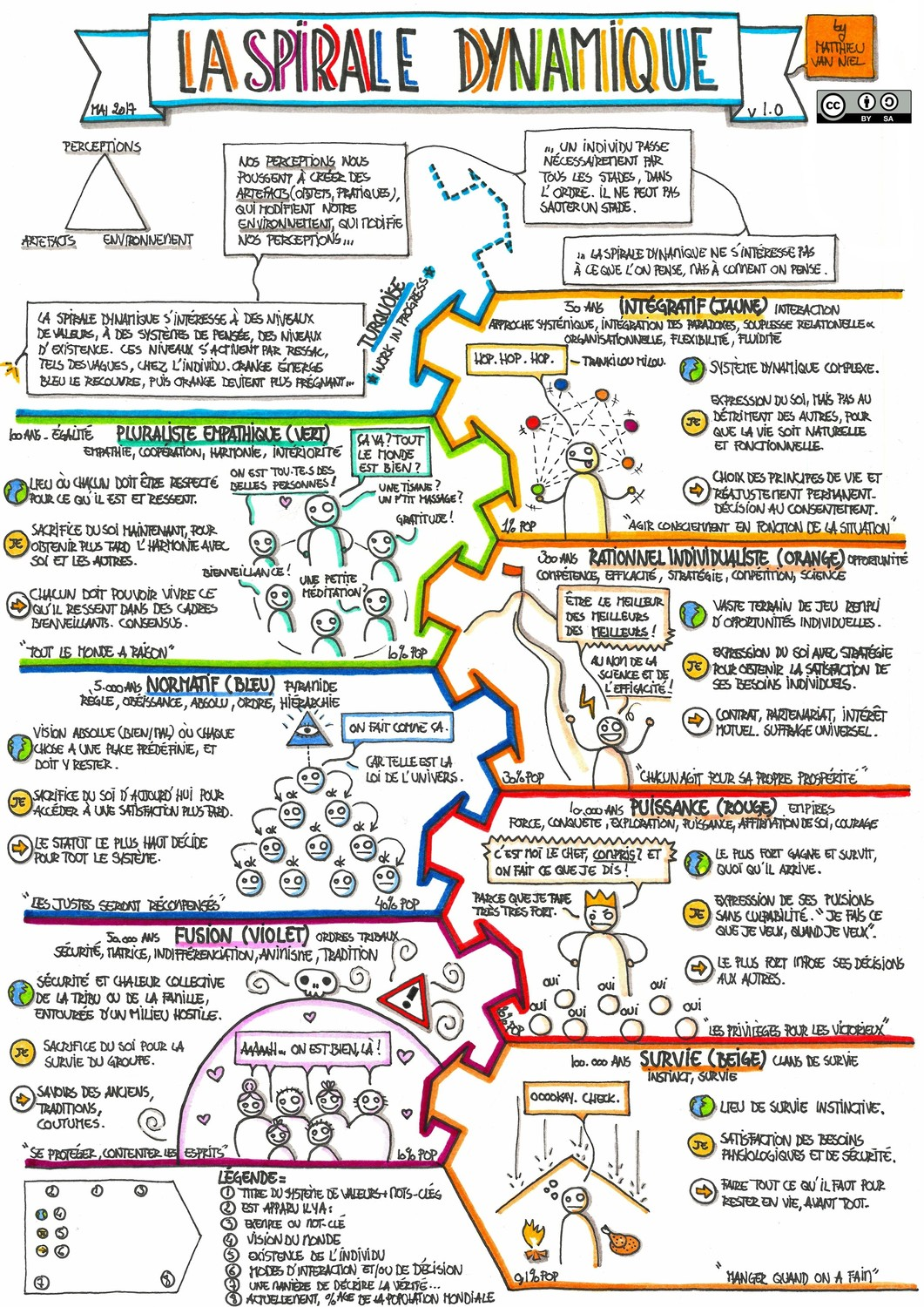 Graphique conçu par l'auteur en marge du Mooc Colibris // Université du Nous consacré à la gouvernance partagée